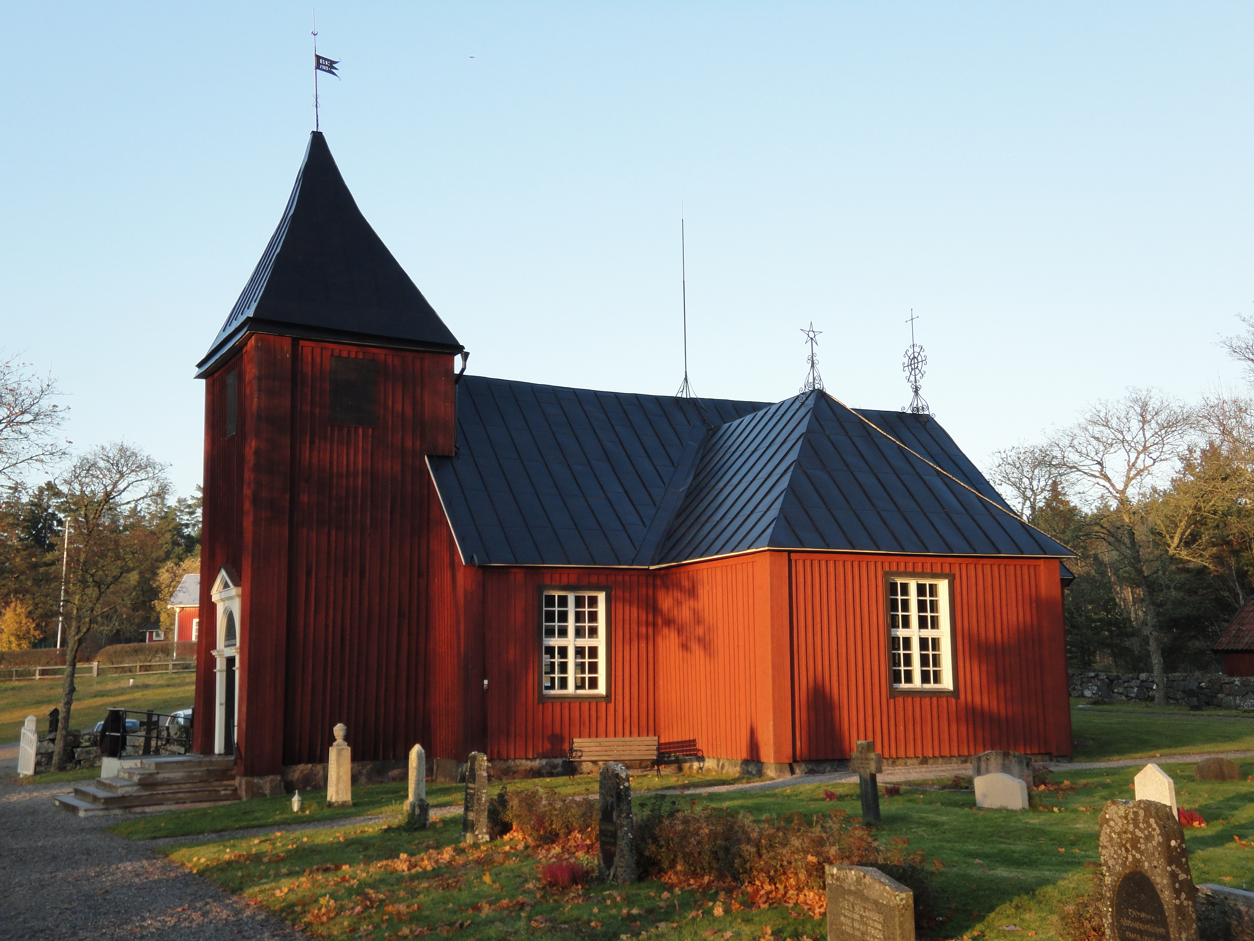 Singö kyrka, Norrtälje kommun.